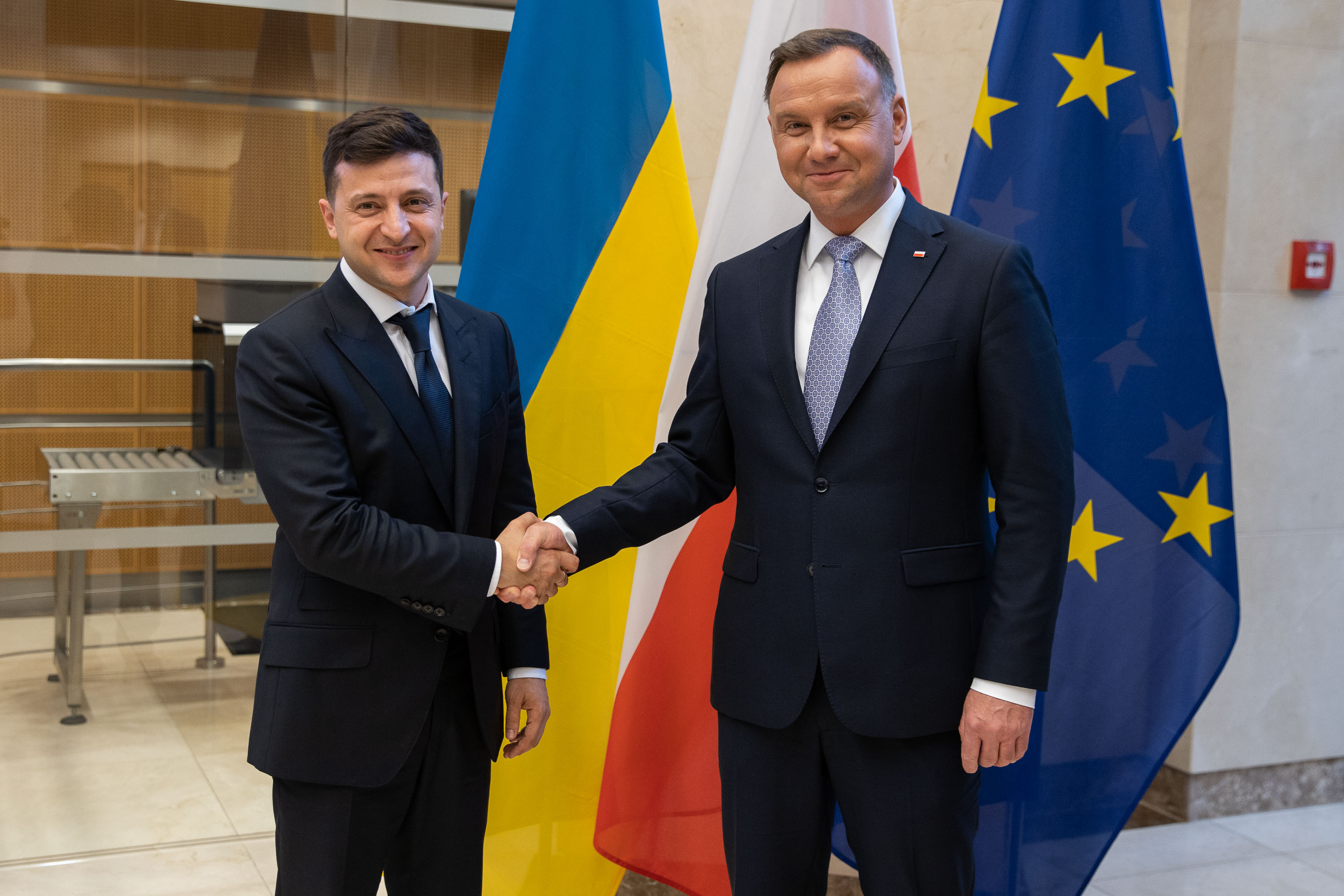 Визит Президента Украины в институты ЕС и НАТО в Брюсселе